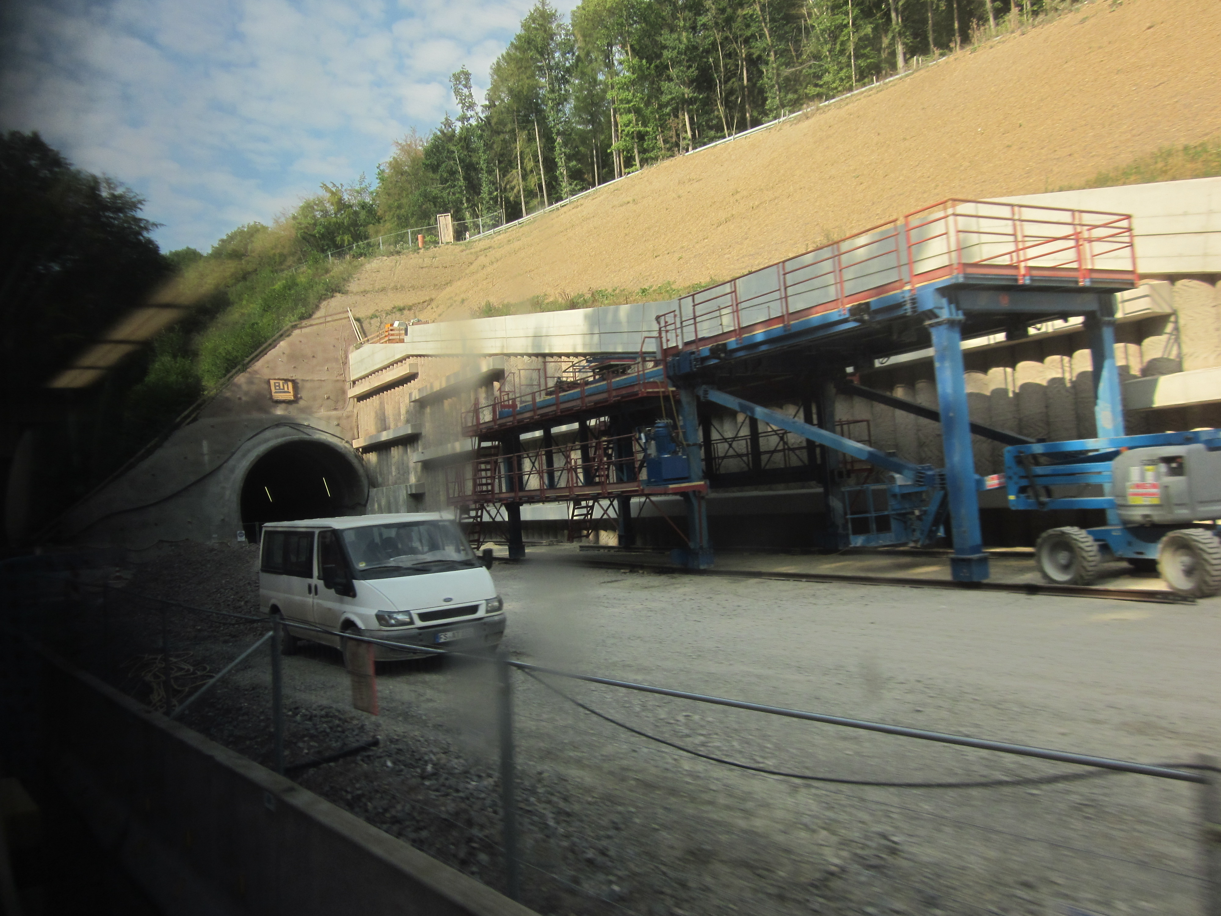 Nordostportal des neuen Zierenberger Tunnels (in Bau), fotografiert aus einem 628 der Kurhessenbahn